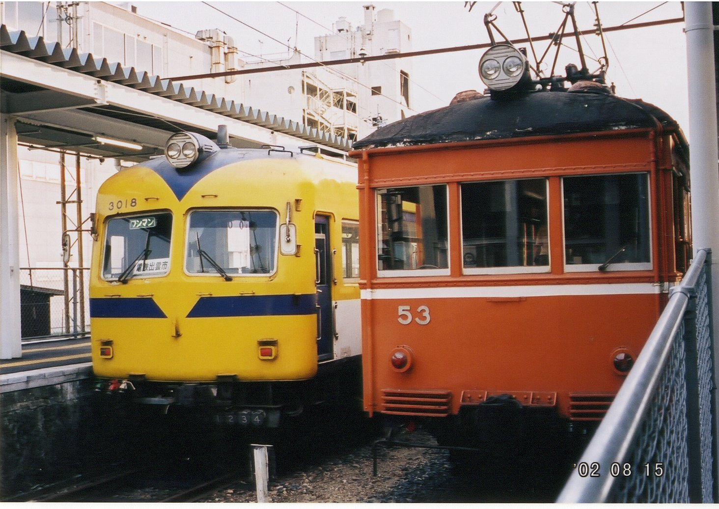 ビール列車